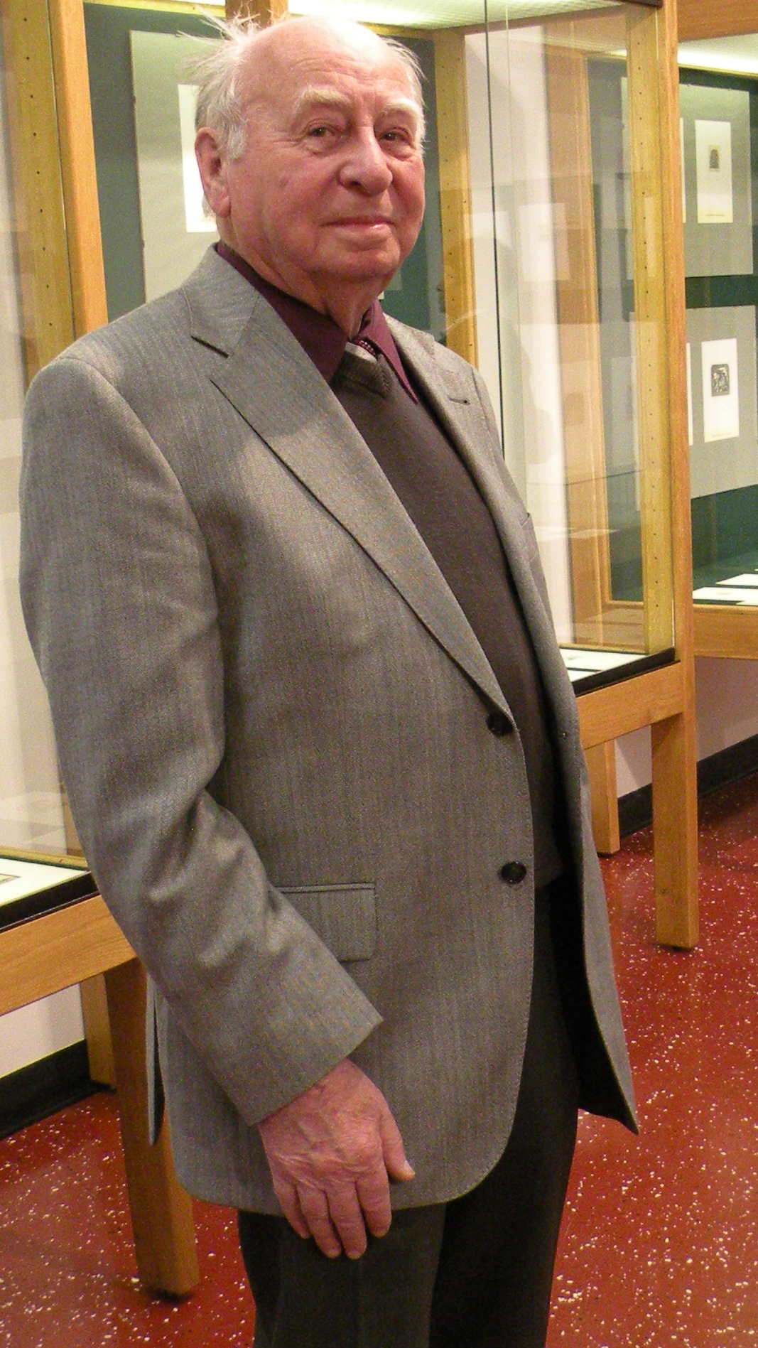 Ottmar Premstaller, Ex Libris Experte aus Sankt Georgen an der Gusen im Bezirk Perg in Oberösterreich